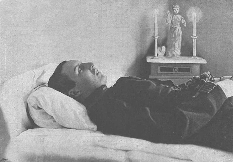 Habsburg–Lotaringiai László főherceg a ravatalon